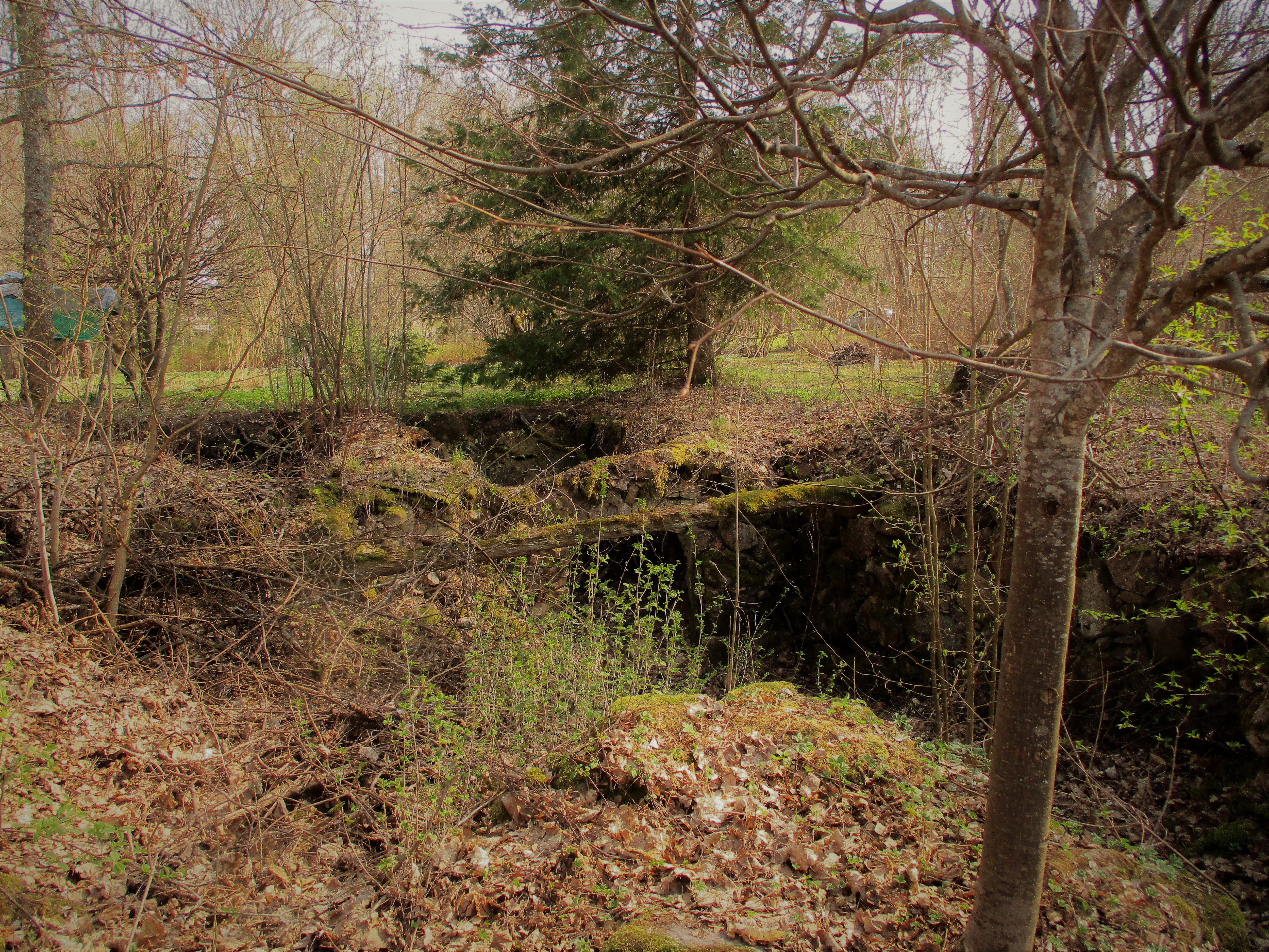 Vaade loodest linnuseala künkalae maapinnas olevatele keldriruumidele.